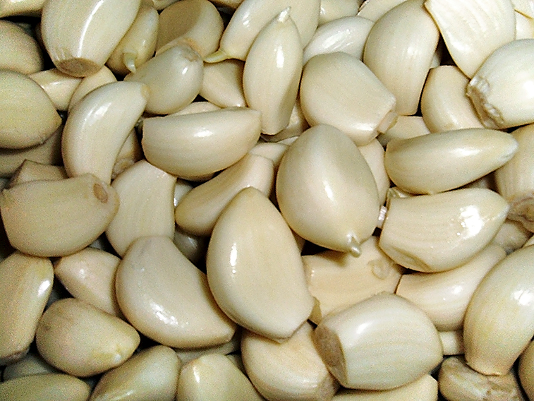 Peeled garlic